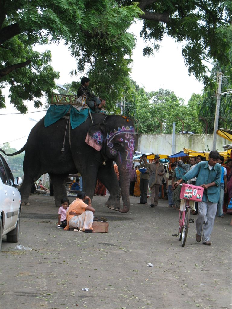 Outside Mahakaleshwar temple